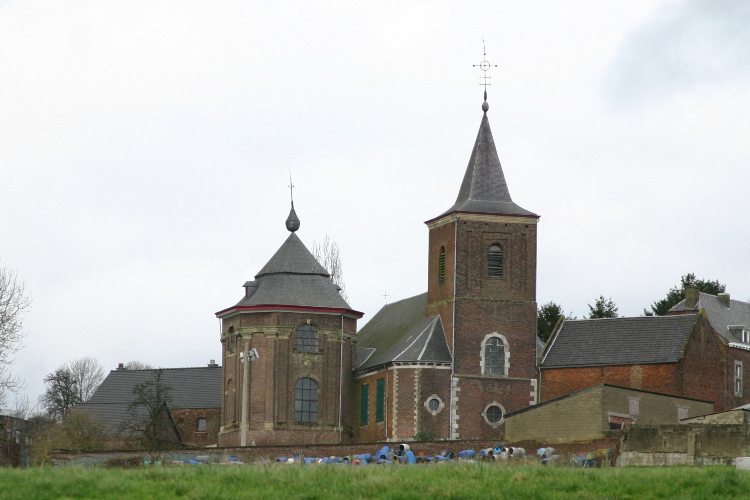 Kierch vun Neufchâteau, Gemeng Dalhem, Provënz Léck.